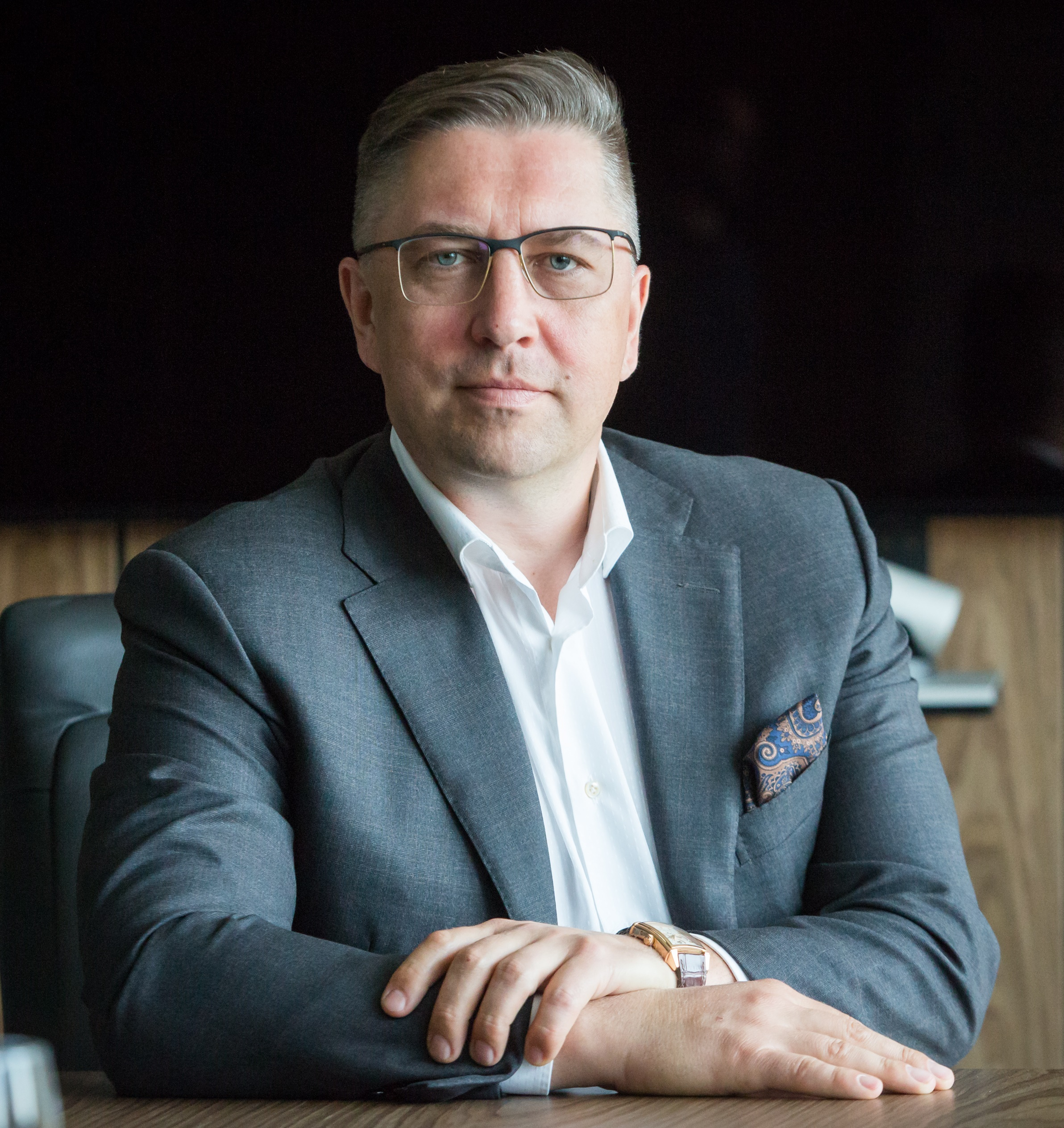 Nuotr. autorius Martynas Ambrazas